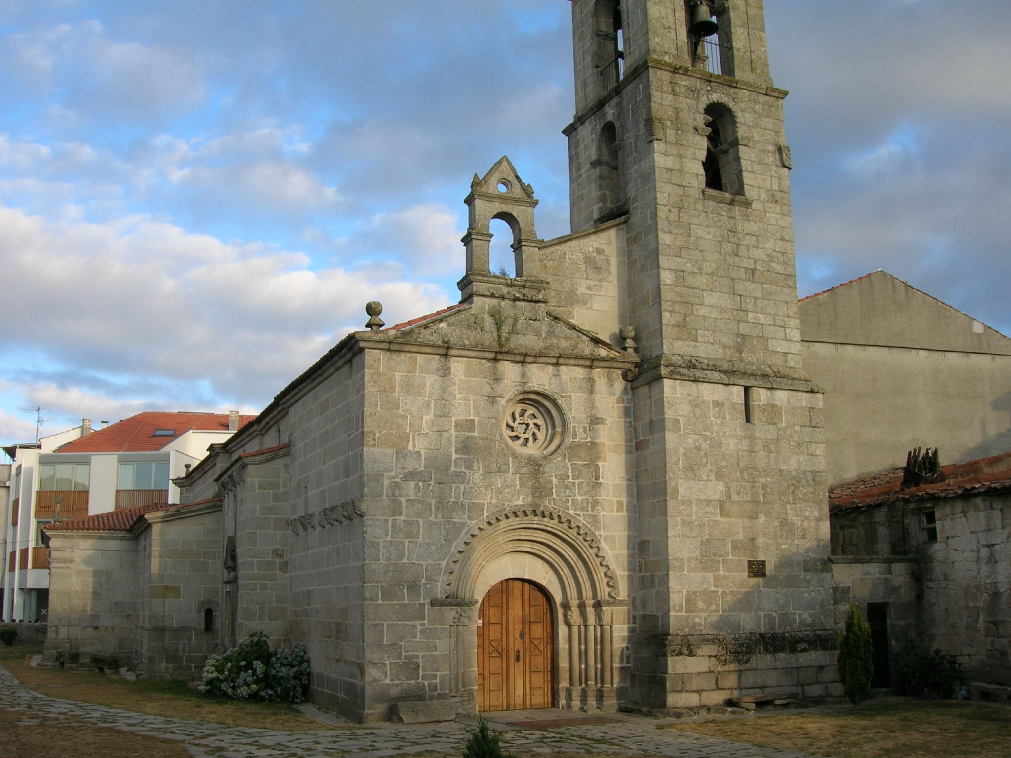 Iglesia de origen románico que ha sufrido sucesivas reformas. Su fachada occidental es el elemento más importante que se conserva de la primitiva fábrica.